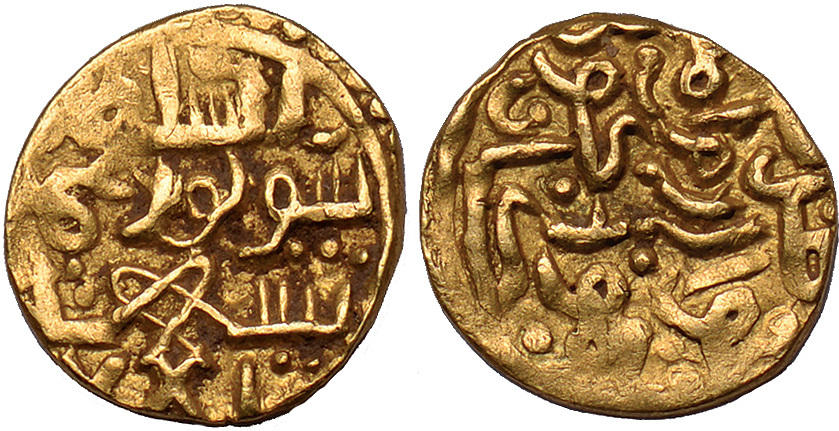 سکه تیمور لنگ ضرب خوارزم بسال ۷۸۱ هجری